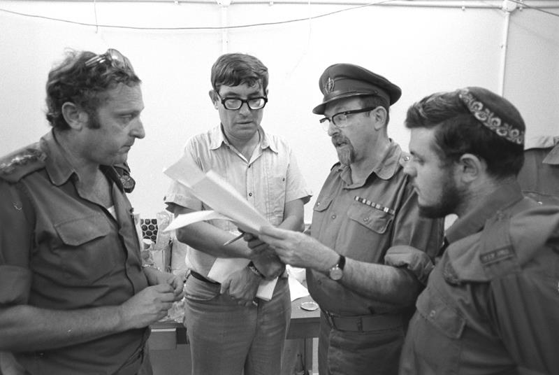 מלחמת יום הכיפורים הרב הצבאי הראשי אלוף מרדכי פירון לשמאלו מפקד גלי צה"ל יצחק לבני.